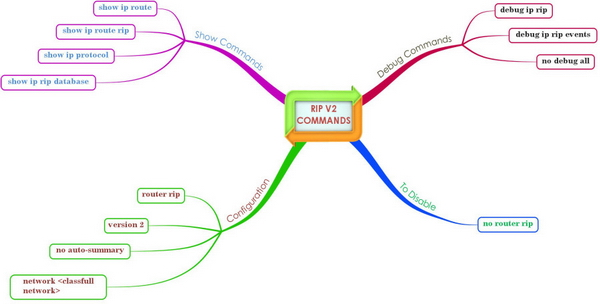 Монгол: rip command